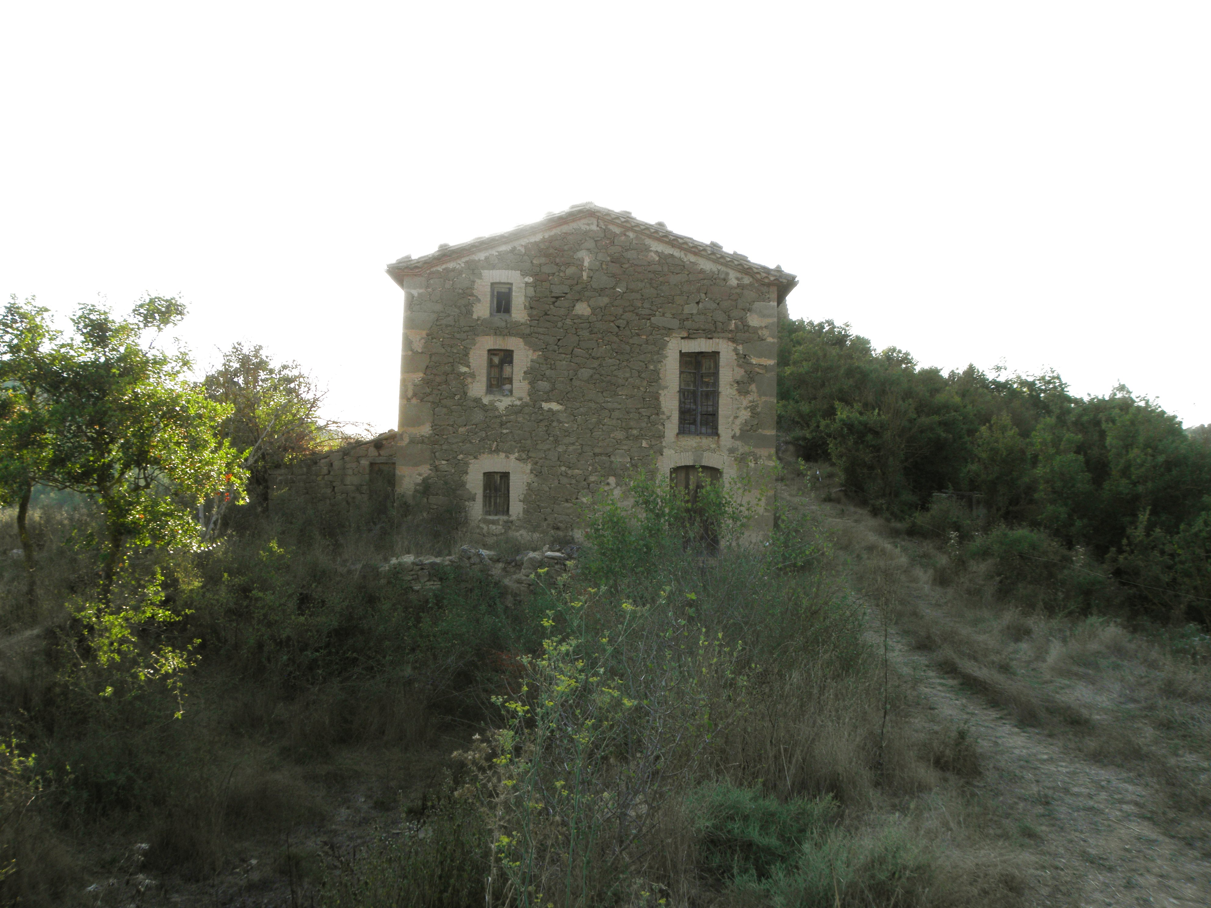 Casa del nucli de Madrona (Pinell de Solsonès). A la part inferior esquerra, la bassa (seca). A la dreta de la casa, sota els pins de l'inici del bosc, el pou. Entre la casa i el pou, el camí que puja a les restes de l'església romànica i el castell